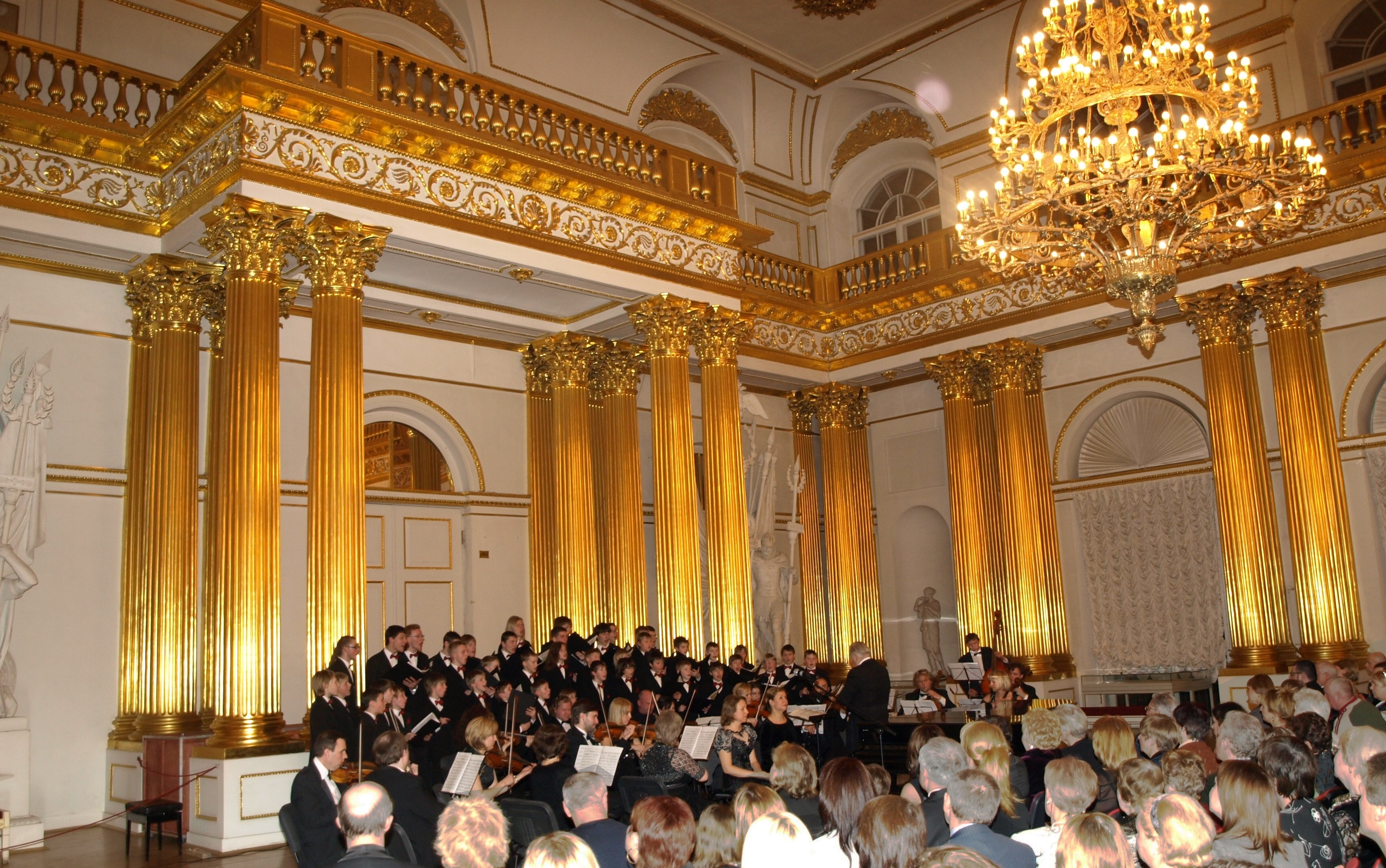 2010 m. kovo 20 d. berniukų ir jaunuolių choras „Dagilėlis“ (meno vadovas Remigijus Adomaitis) koncertavo Sankt Peterburgo valstybiniame Ermitaže. Koncerte dalyvavo Sankt Peterburgo valstybinio Ermitažo orkestras „Camerata Sankt Peterburg“. Dirigavo Maestro Saulius Sondeckis.